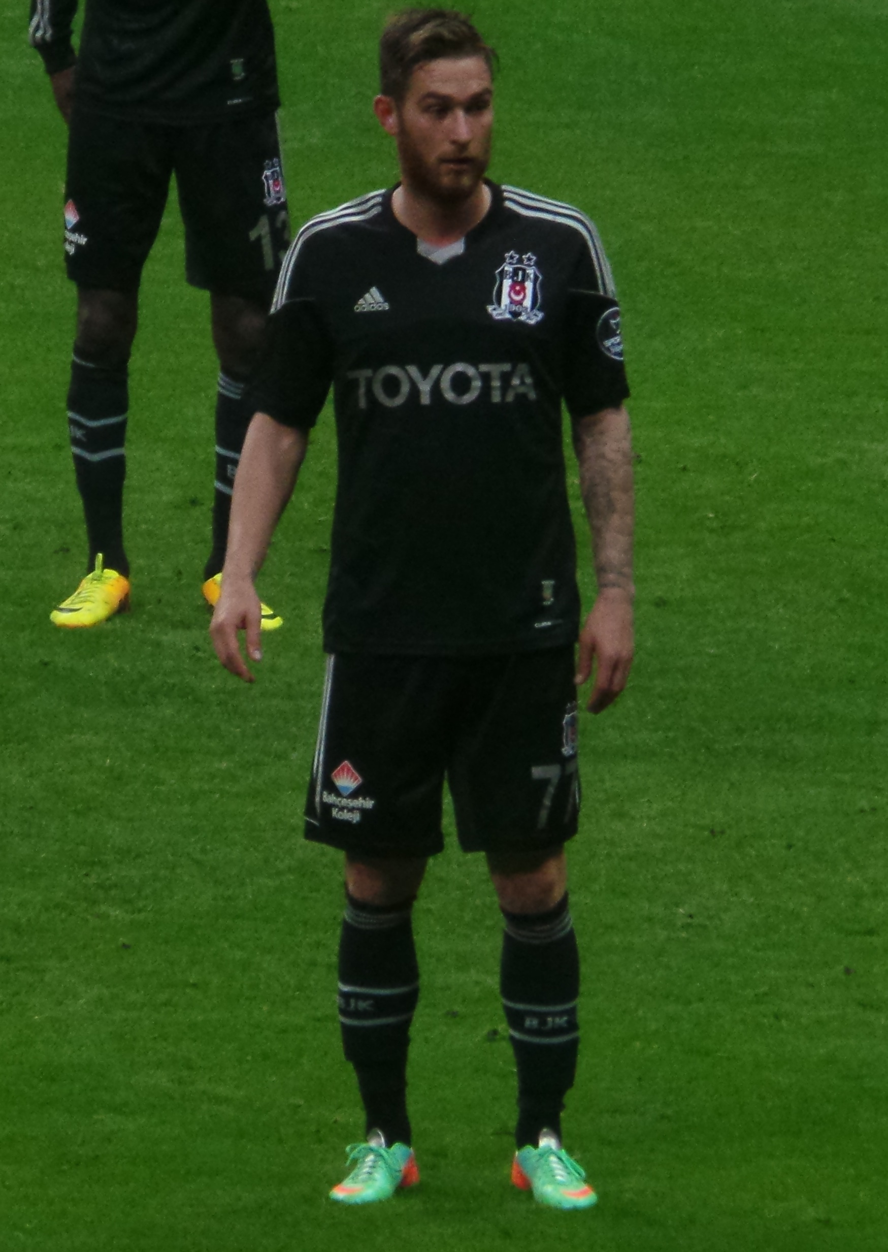 Ömer Şişmanoğlu